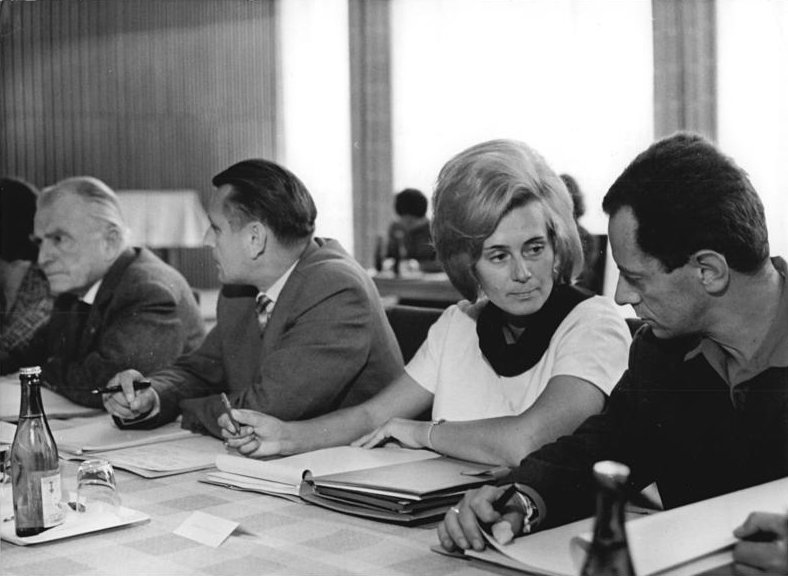 Berlin, Tagung der DDR-Wahlkommission Zentralbild Kohls 29.7.1965 Die Wahlkommission der Republik tagte am 29.7.1965 unter Vorsitz des Oberbügermeisters Friedrich Ebert, Mitglied des Politbüros des ZK der SED und Mitglied des Staatsrates. UBz: Prof. Dr. habil. Dr. h. c. Dr. h. c. Georg Mayer, Direktor des Institutes für Agrarökonomie an der Karl-Marx-Universität Leipzig; Helmut Wiese, Vorsitzender des Rates des Kreises Angermünde; Anne-Rose Neumann, Sprecherin beim Deutschen Fernsehfunk Berlin und Dieter Noll, Schriftsteller. Abgebildete Personen: Noll, Dieter: Schriftsteller, DDR (GND 119157322) Mayer, Georg Prof. Dr.: Rektor der Karl-Marx-Universität Leipzig, Präsident der Akademie der Wissenschaften (AdW), DDR (GND 118732307) Neumann, Anne Rose: Sprecherin beim Deutschen Fernsehfunk Berlin, DDR